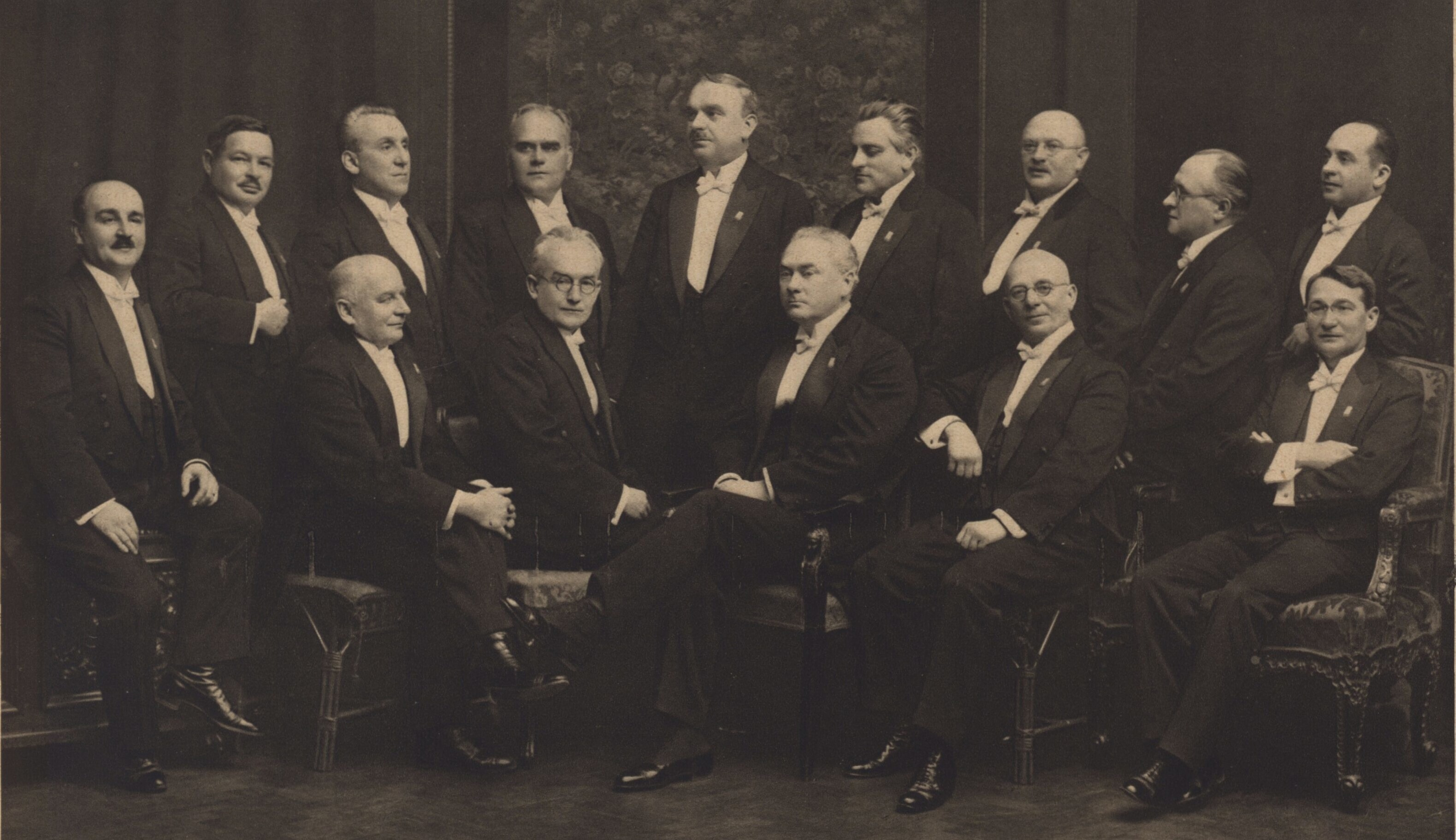 Pěvecké sdružení pražských učitelů v roce 1928. Výstřižek z Pestrého týdne.